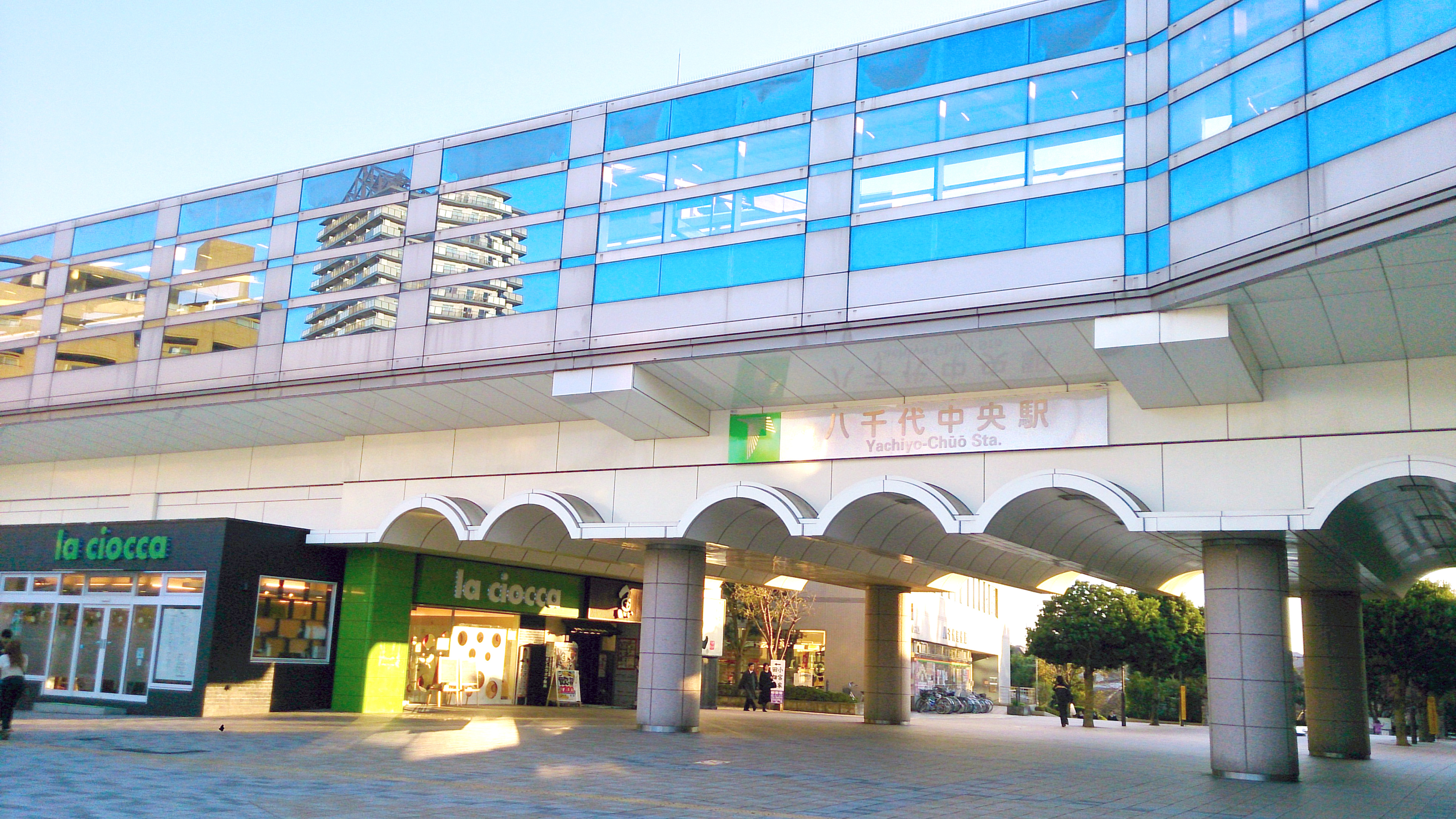 八千代中央駅南口